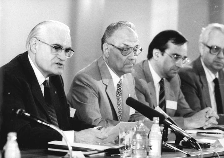 ADN-ZB Roeske-22.5.89-frs-Berlin: CDU-Kolloquium - Gerald Götting (l.), Vorsitzender der CDU, eröffnete in Berlin zum Thema "Frieden für unser gemeinsames Haus Europa" ein zweitägiges internationales Kolloquium der CDU. 2.v.l. Wolfgang Heyl, stellv. Vorsitzender der CDU. 3.v.l. Luc Martens, Präsidiumsmitglied der Christlichen Volkspartei (CVP), Beigeordneter Kabinettschef beim Minister für Unterricht und Erziehung Belgiens. Rechts Prof.Dr. Luc Delanghe, Stellv. Generalsekretär des Allgemeinen Christlichen Arbeitnehmerverbandes (ACW), Mitglied des Präsidiums der Christlichen Volkspartei (CVP-Belgiens)."